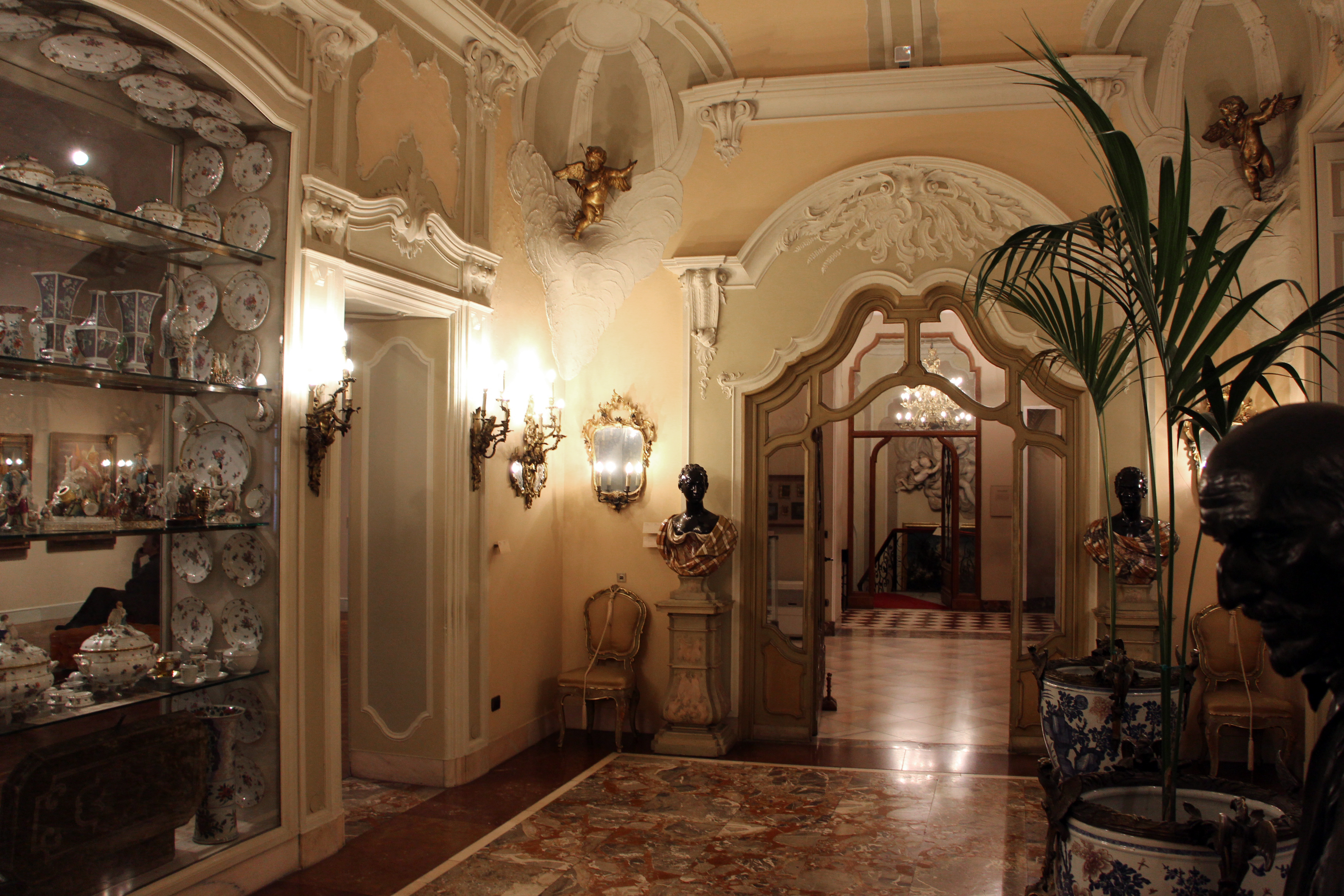 Milano, miscellanea